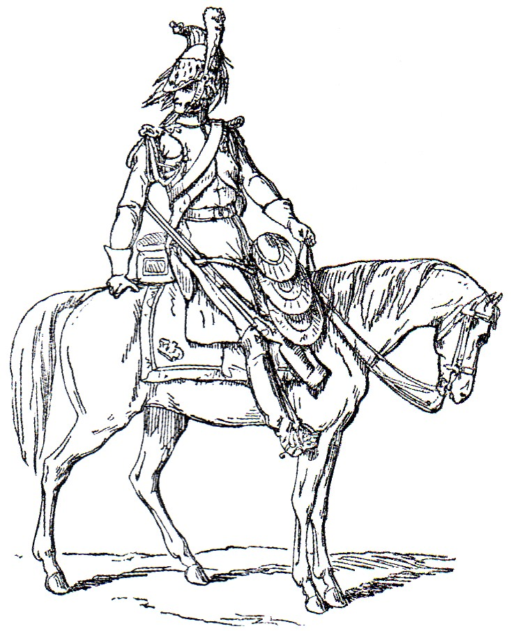 Dragone a cavallo della Vecchia Guardia